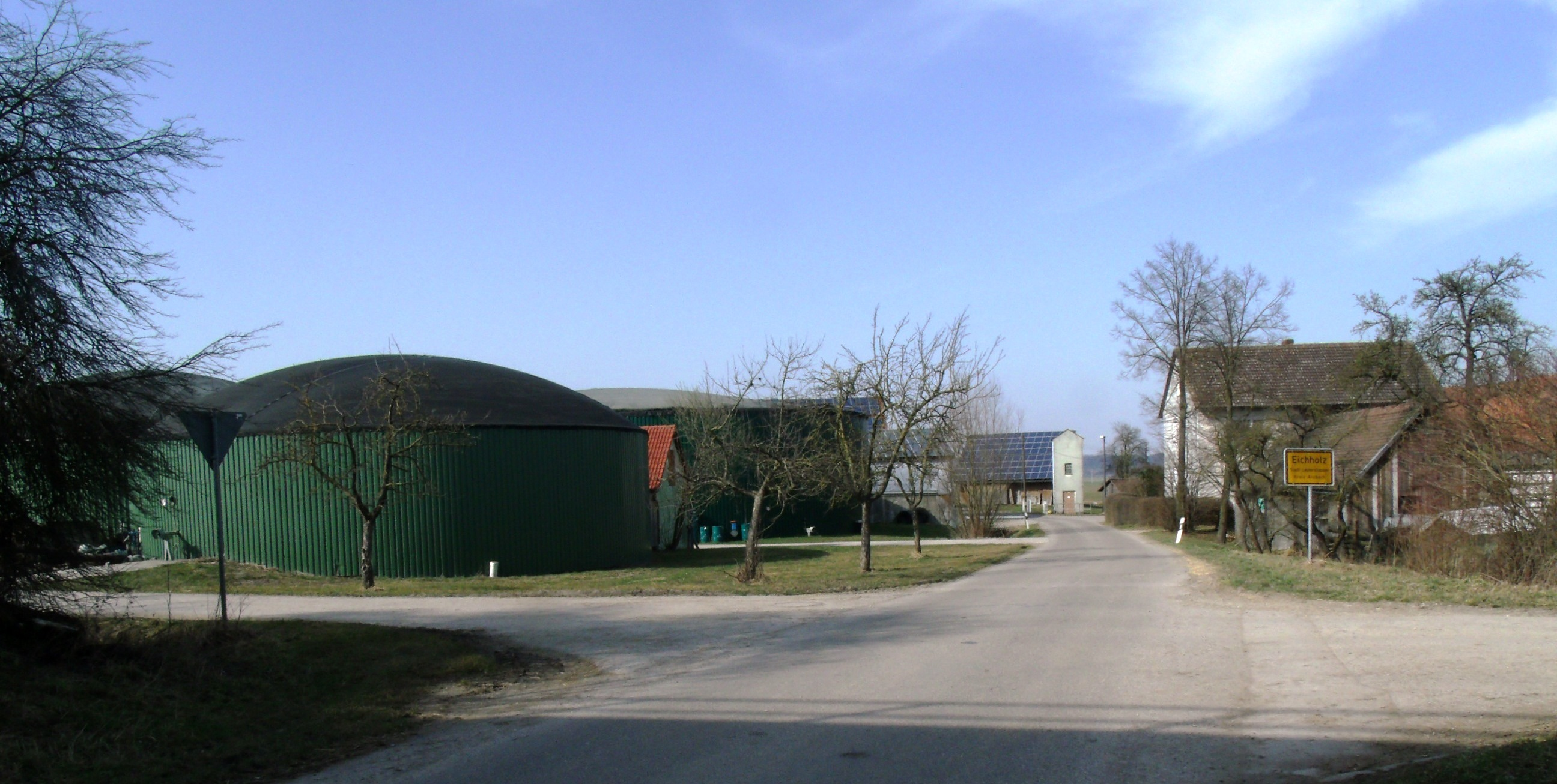 Eichholz, Ortsteil von Leutershausen im mittelfränkischen Landkreis Ansbach